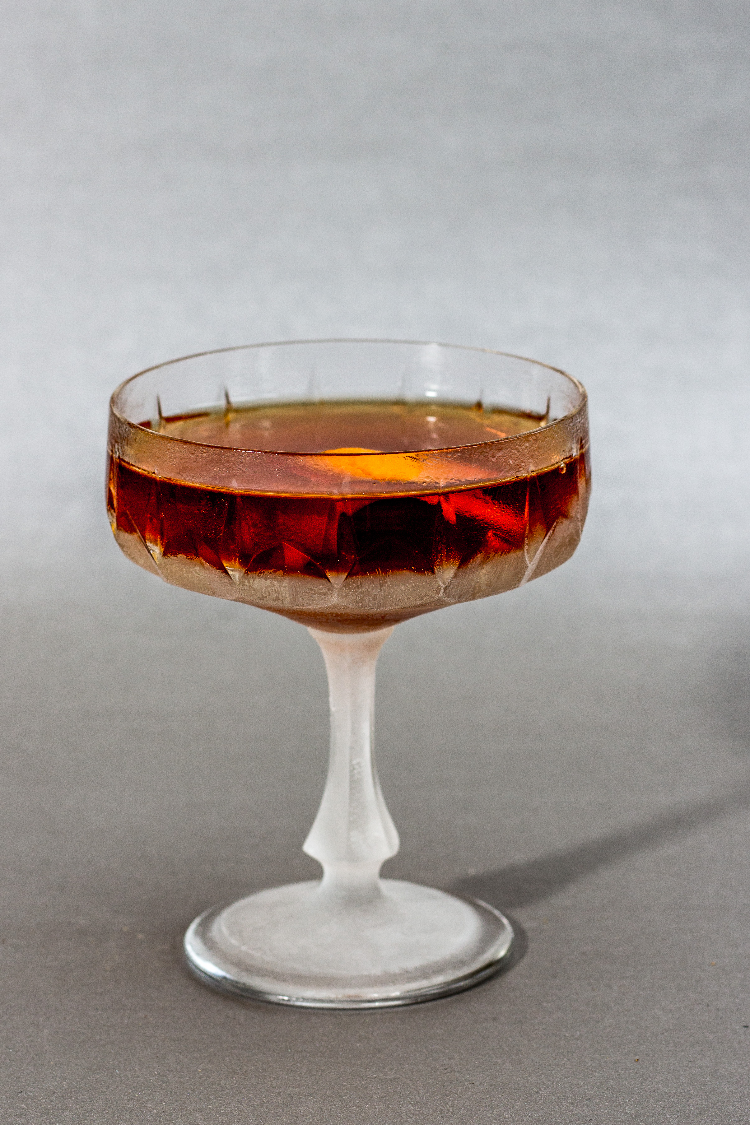 Vieux Carré in Coupe